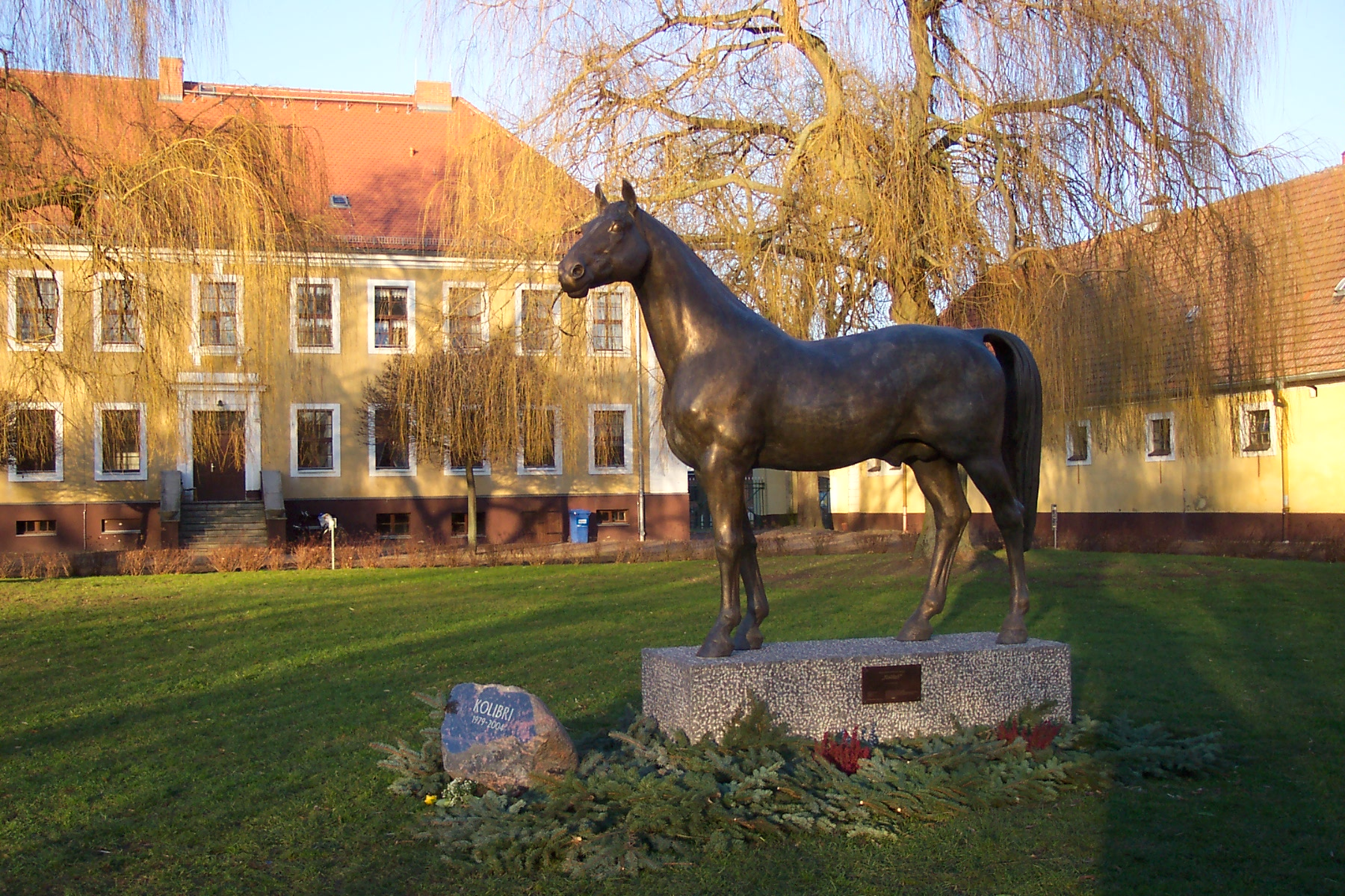 Bronzestatue von Kolibri (Pferd) im Hof des Landgestütes Neustadt/Dosse